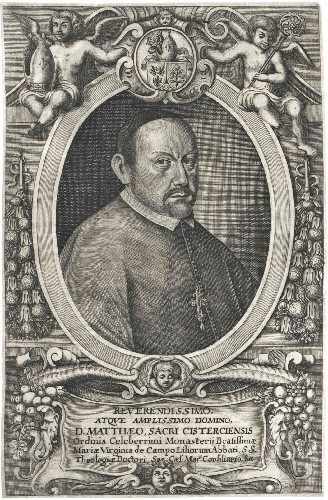 Matthäus Kolweiß (1620-1695), Zisterzienserabt von Stift Lilienfeld, Rektor der Universität Wien